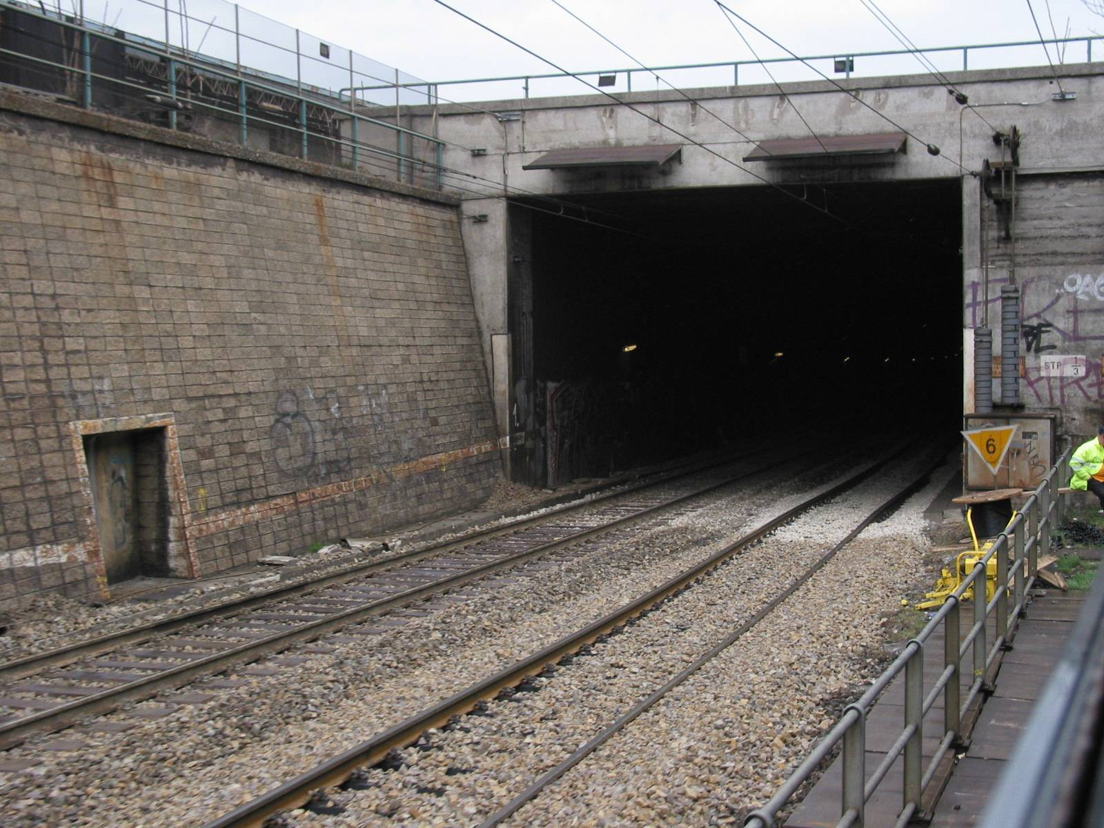 de: S-Bahn bei Wien Mitte en: Tunnel of S-Bahn Vienna